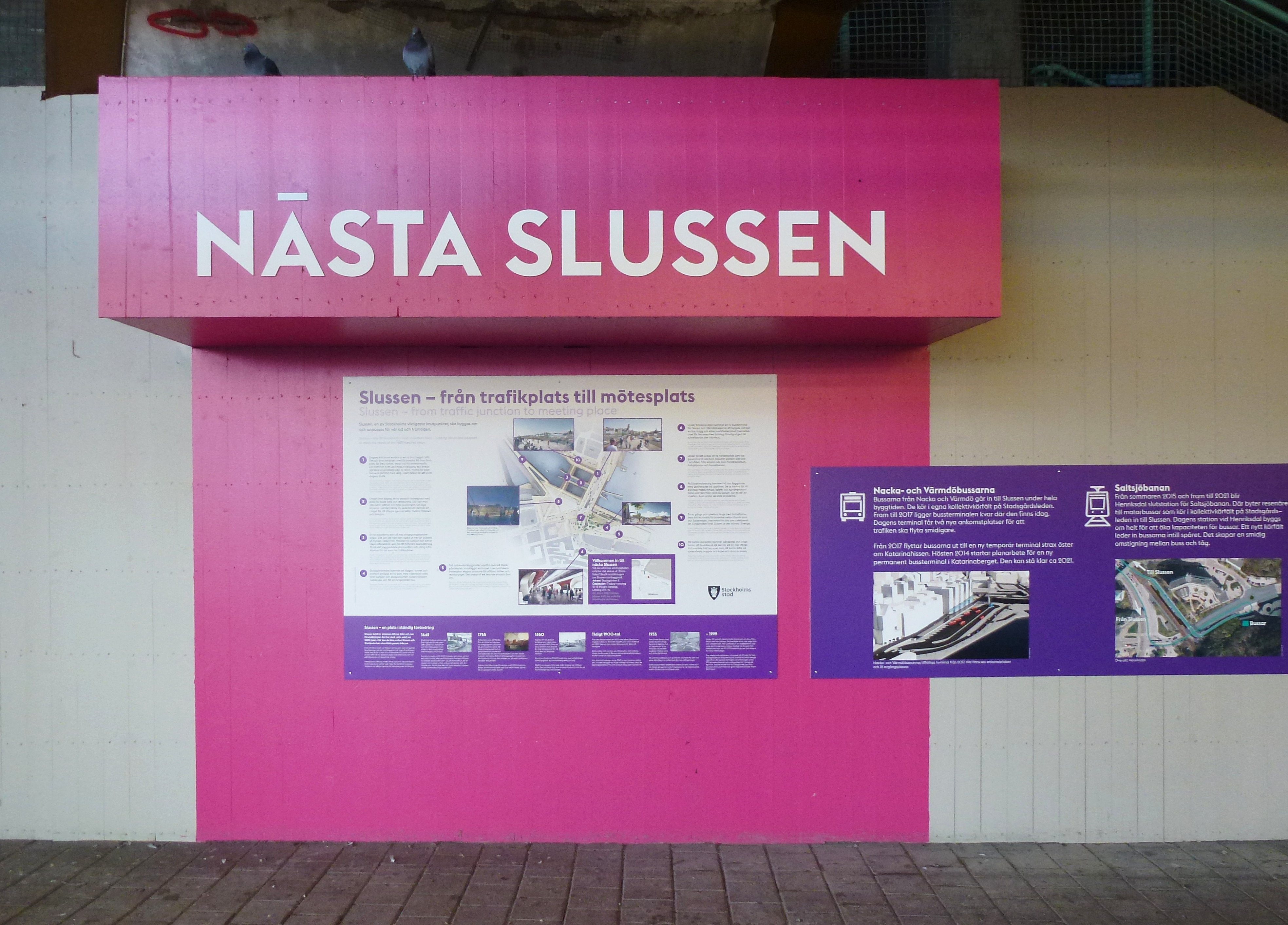 "Nästa Slussen", info om Nya Slussen på Saltsjöbanans perrong